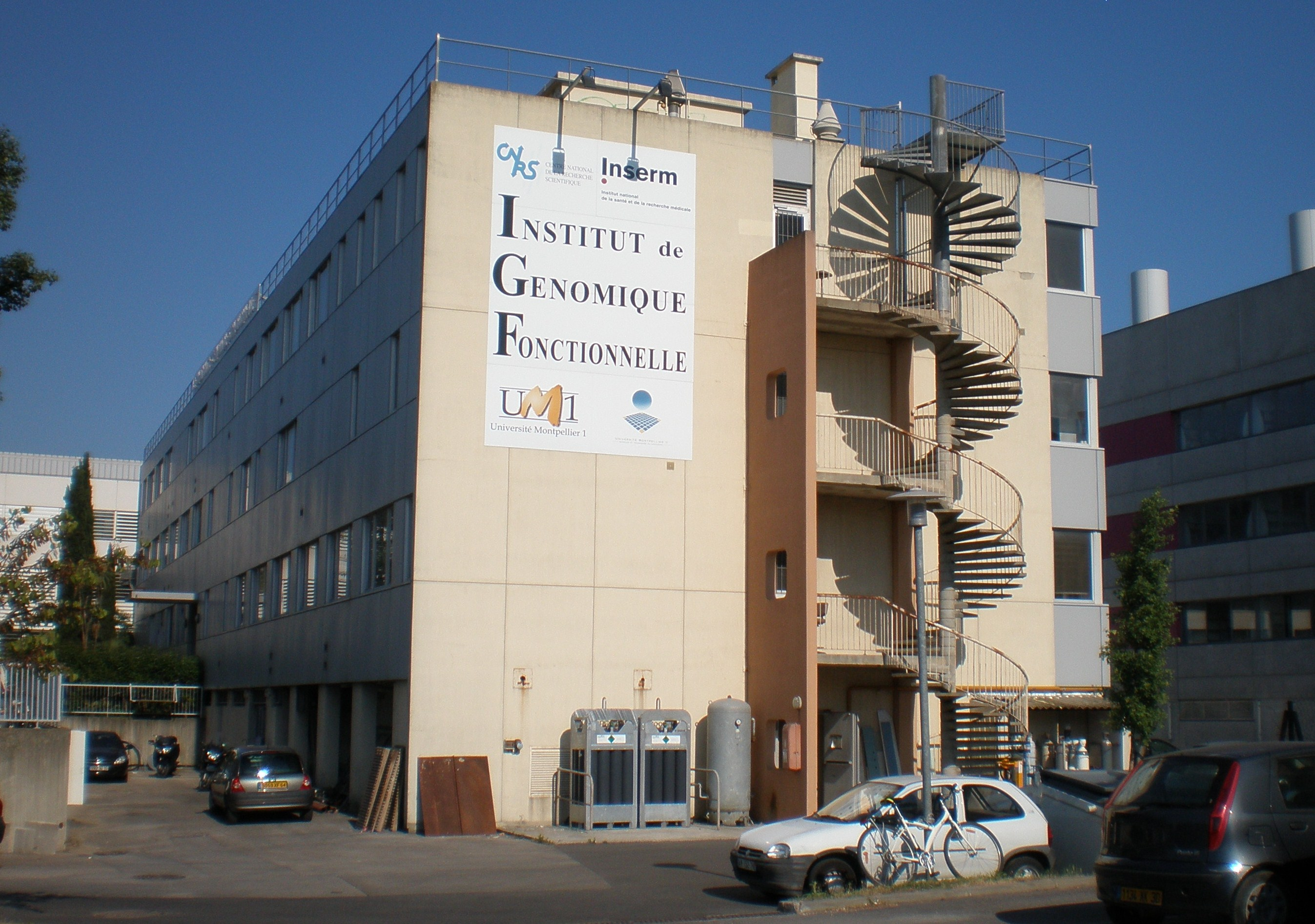 L’institut de Génomique Fonctionnelle de Montpellier (France), laboratoires de recherche Université Montpellier 1 et 2, CNRS, INSERM et CHU